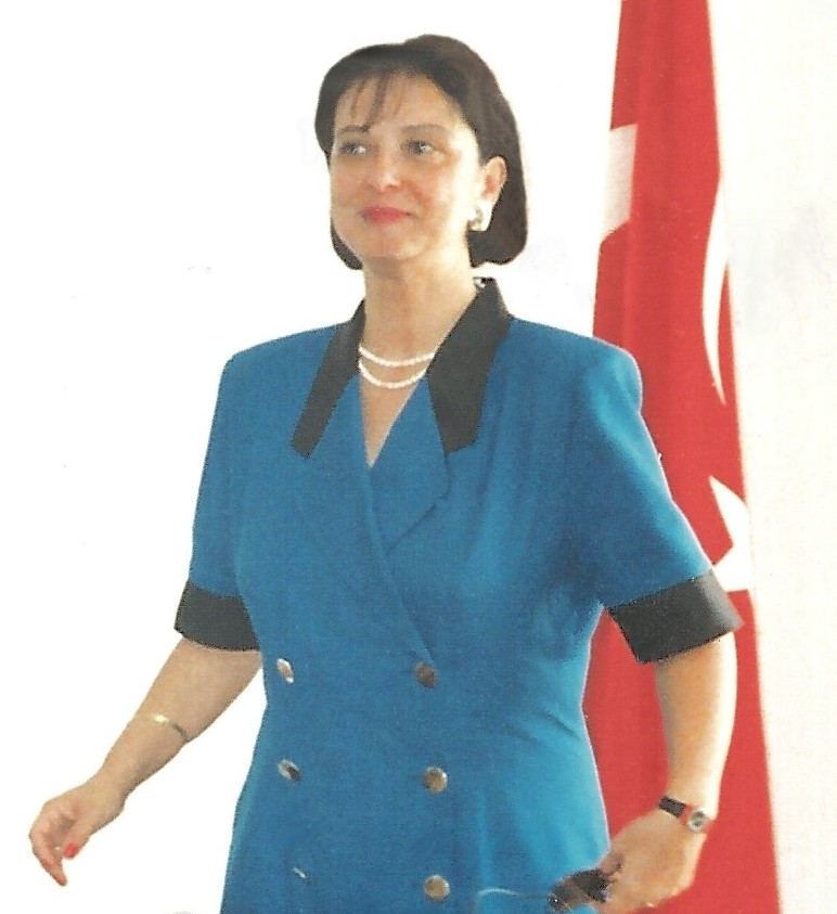 Özal inspecting a local governor. The ceremony marking of the beginning of governance for the first Kaymakam Eyüp Sabri Kartal in Kavaklıdere, with President Turgut Özal and Vali Lale Aytaman. Kaymakamlığı ziyaret eden Özal ve Kaymakam Eyüp Sabri Kartal'ın (16 Ağustos 1991) de ilk görevine başlama törenine iştiraki "sivil cumhurbaşkanından sivil yönetime destek" olarak değerlendirilmiştir. Özal, her zaman sivil yönetimi savunmuş ve halk tipi sivil kıyafetlerden hoşlanmıştır. Kamu kurum ve kuruluşlarını resmi kıyafetiyle ziyaret eden diğer Cumhurbaşkanlarından farklı olarak çoğu defa kravatsız, keten pantolon, keten ayakkabı ve tişörtle resmi programlara katılmıştır. Yukarıdaki resimde görüldüğü gibi üst rutbeli askerlerin devir teslim törenine katılmazken, küçük bir ilçede kaymakamın göreve başlama törenine katılmıştır. Askeri birlikleri şortla denetlemesi medya tarafından şiddetle eleştirilmiştir. Özal diğer Cumhurbaşkanları gibi konuklarını köşkte ağırlamak yerine, Marmaris Okluk koyundaki resmi yazlıkta ağırlamıştır. Ölümünde sivil cumhurbaşkanı, demokrat cumhurbaşkanı, dindar cumhurbaşkanı pankartlarıyla da bu tutumu desteklenmiştir.